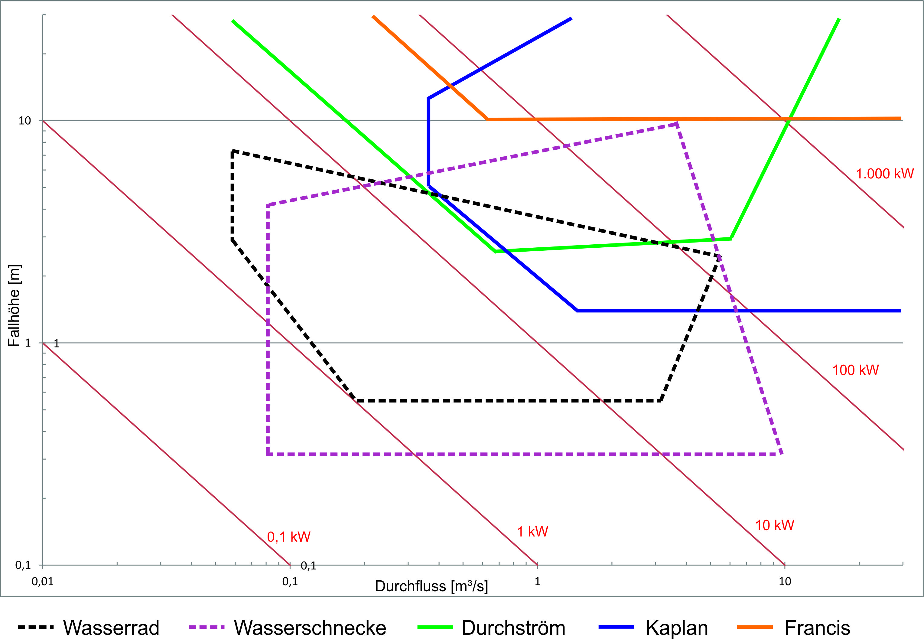 Vergleich von Nettofallhöhe, Durchfluss und erzielbarer elektrischer Leistung für Francis-/Kaplan-Turbinen, Wasserrad, Durchströmturbine und Wasserschnecke für den Einsatzbereich in der Kleinst- und Kleinwasserwirtschaft.